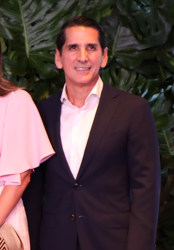 Rómulo Roux